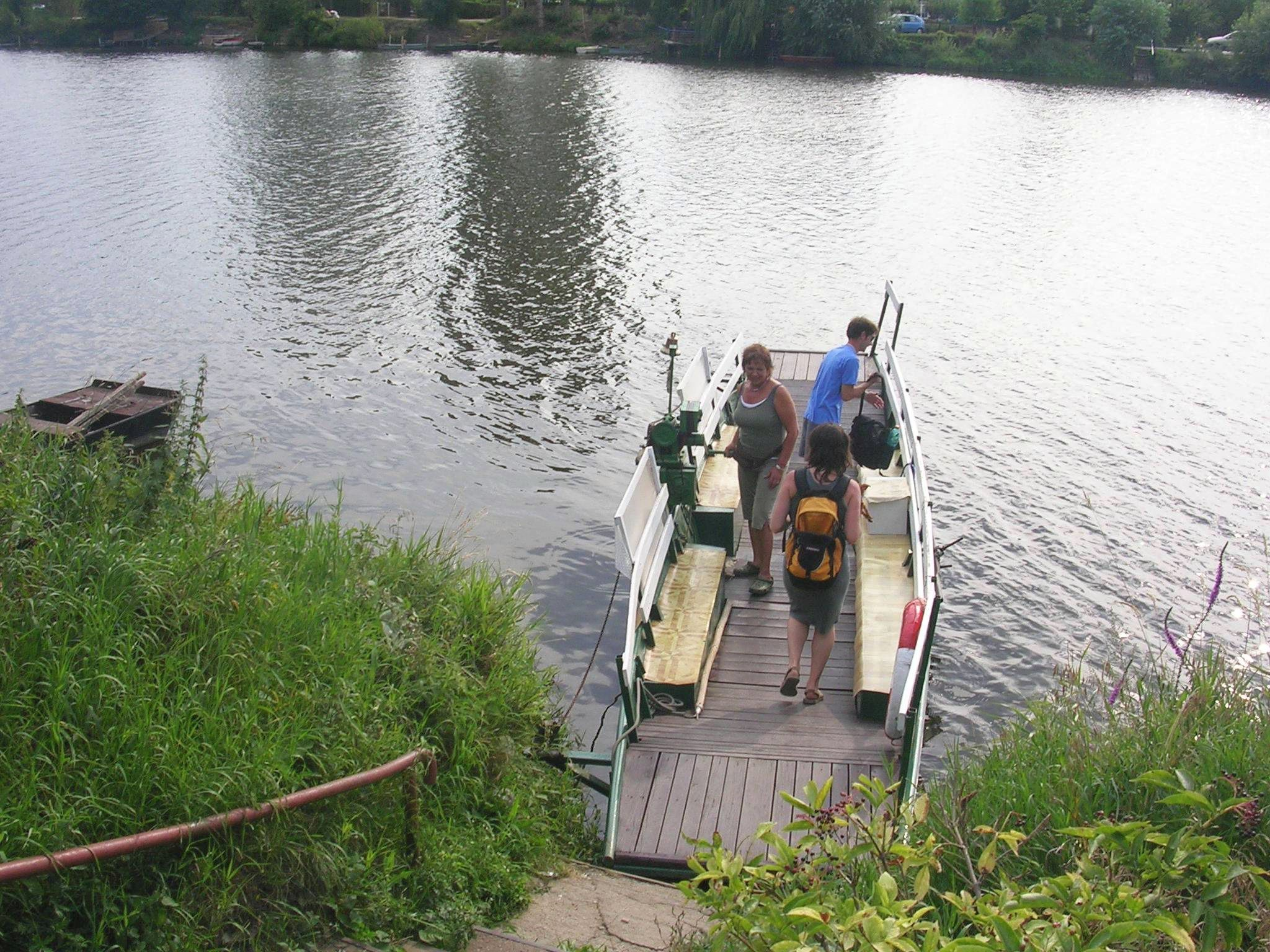 Přívoz Kazín - Dolní Mokropsy